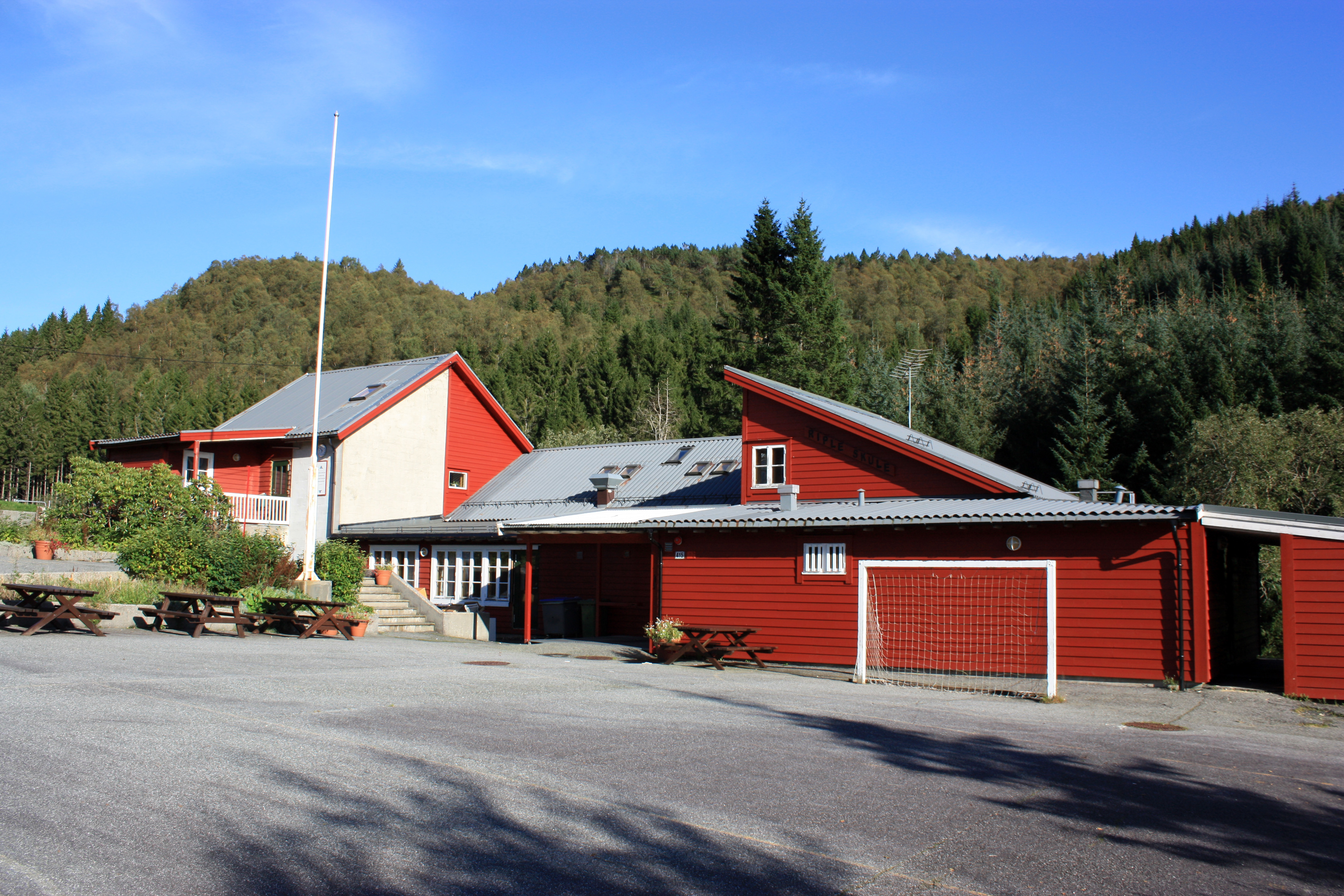 Riple skole, Fana, Bergen.